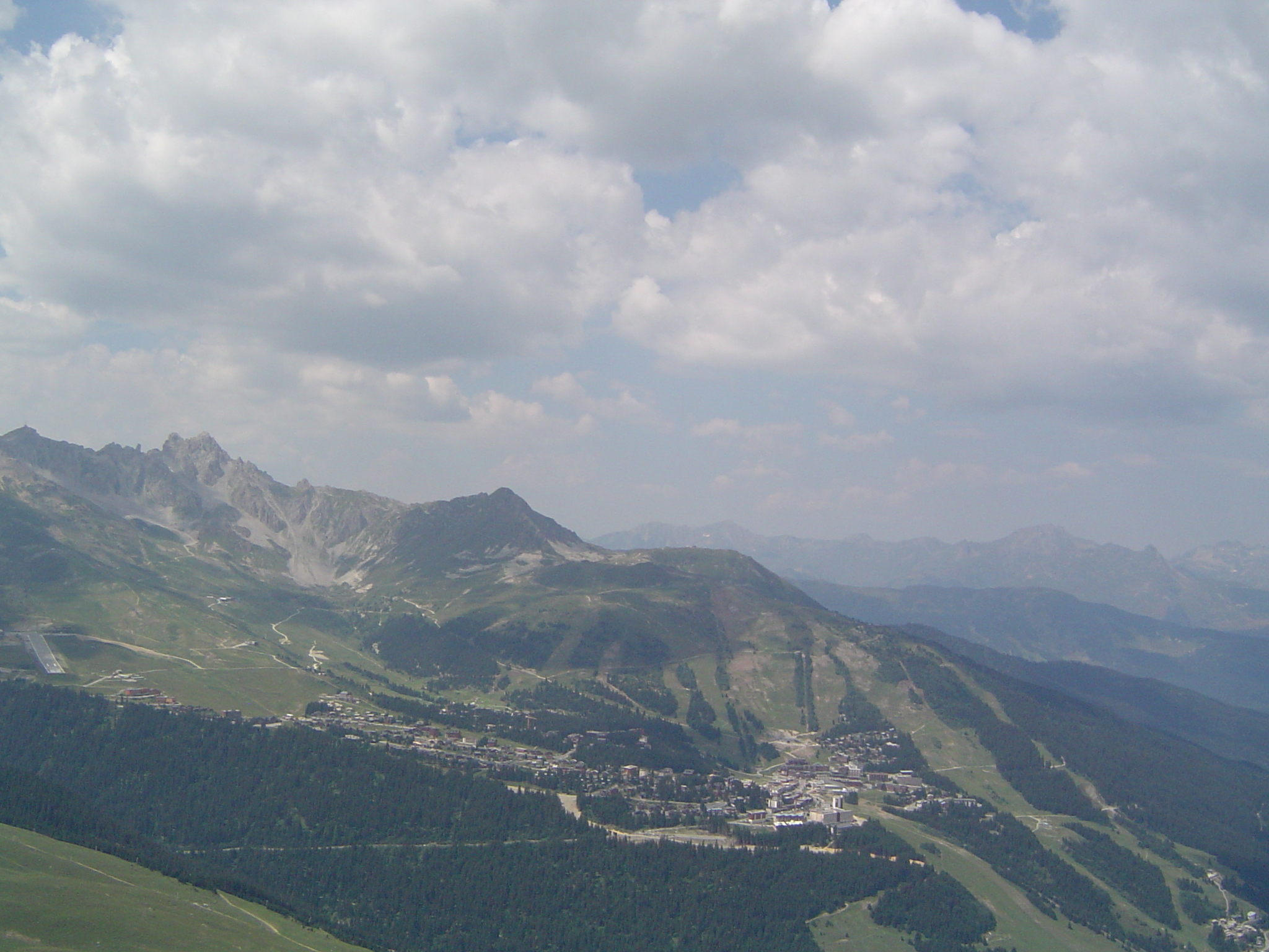 Vue de Courchevel prise durant le mois de juillet 2005 2005. Cevenol2